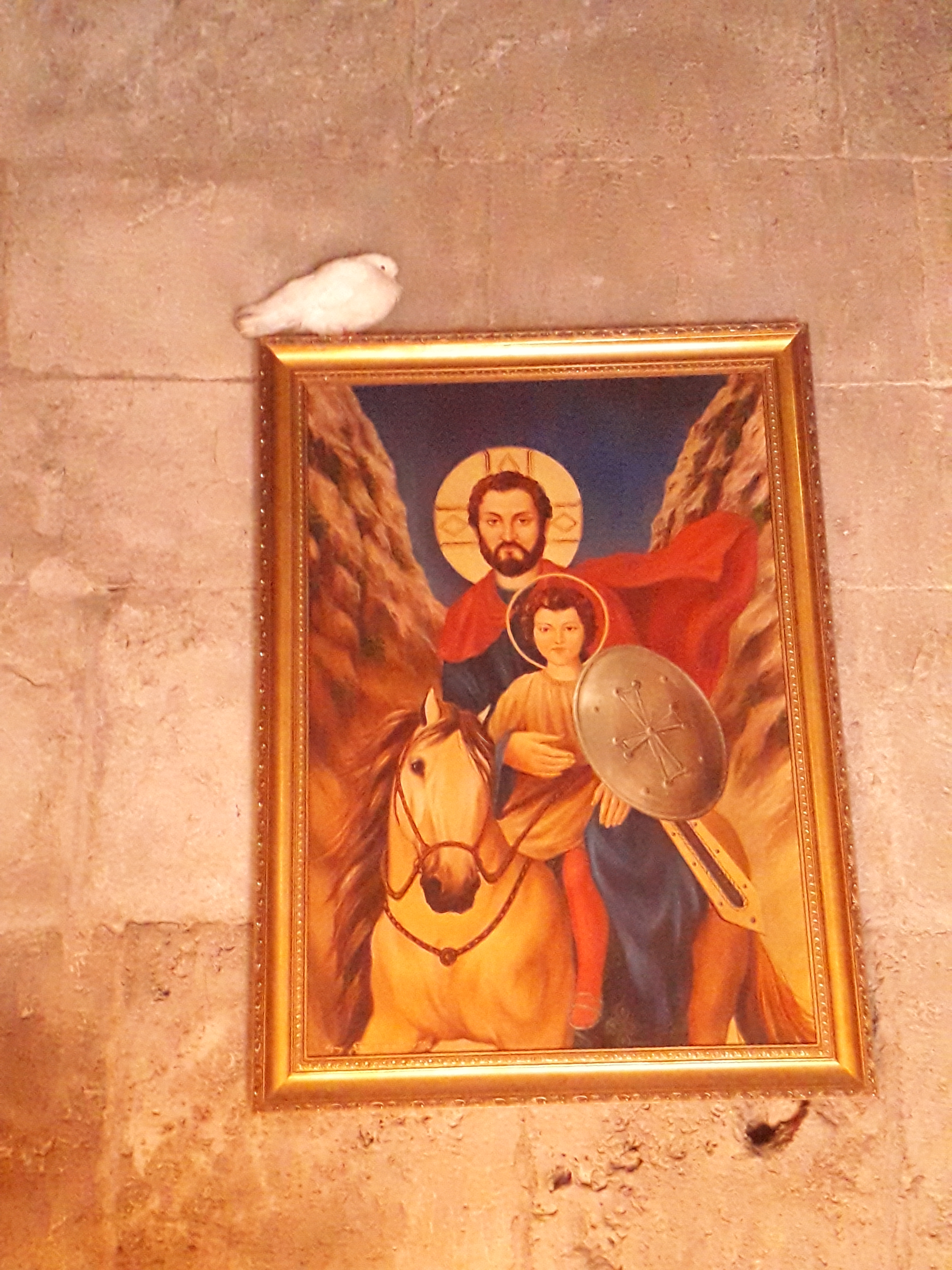 Հաղարծին վանական համալիրի Սբ․ Աստվածածին եկեղեցում աղավին նստել էր սրբապատերի վրա։